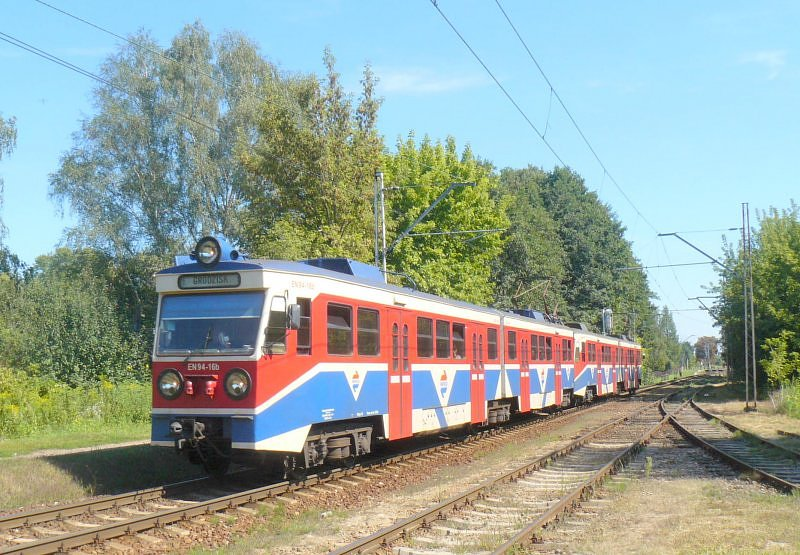 Elektryczne zespoły trakcyjne EN94-16+35 zaraz skończą bieg jako pociąg osobowy WKD 119 z Warszawy Śródmieście WKD. Następnie wrócą tam jako pociąg osobowy WKD 128.